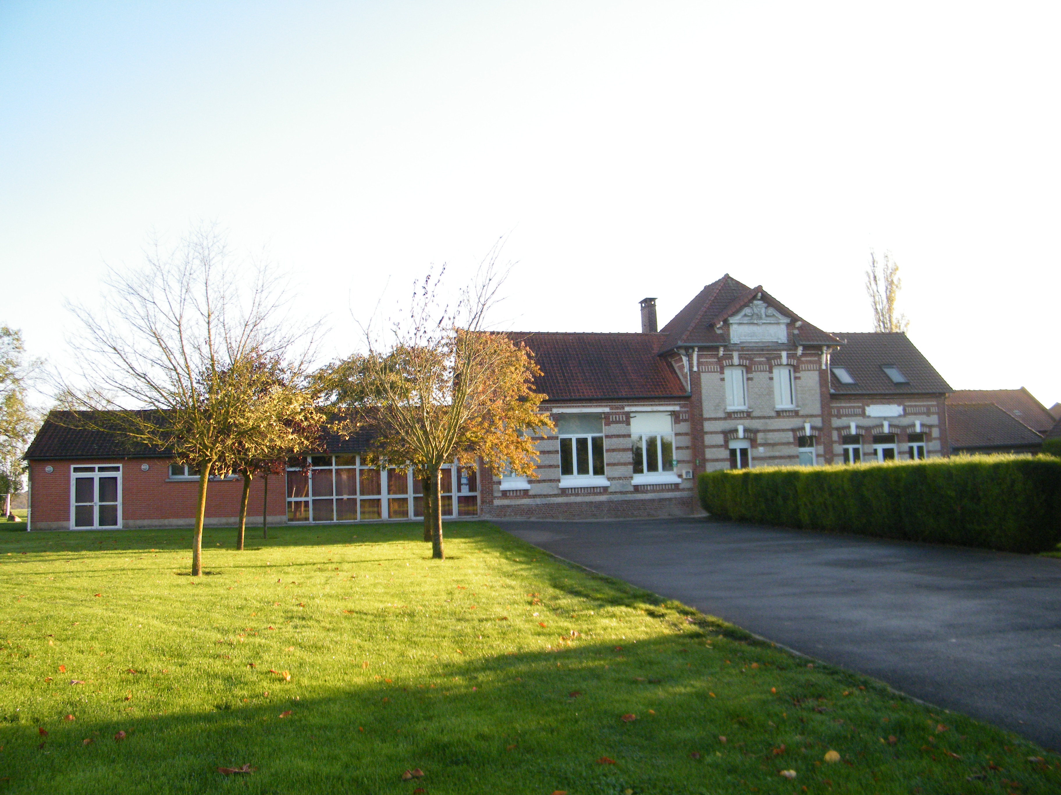 Mairie-école et salle communale.